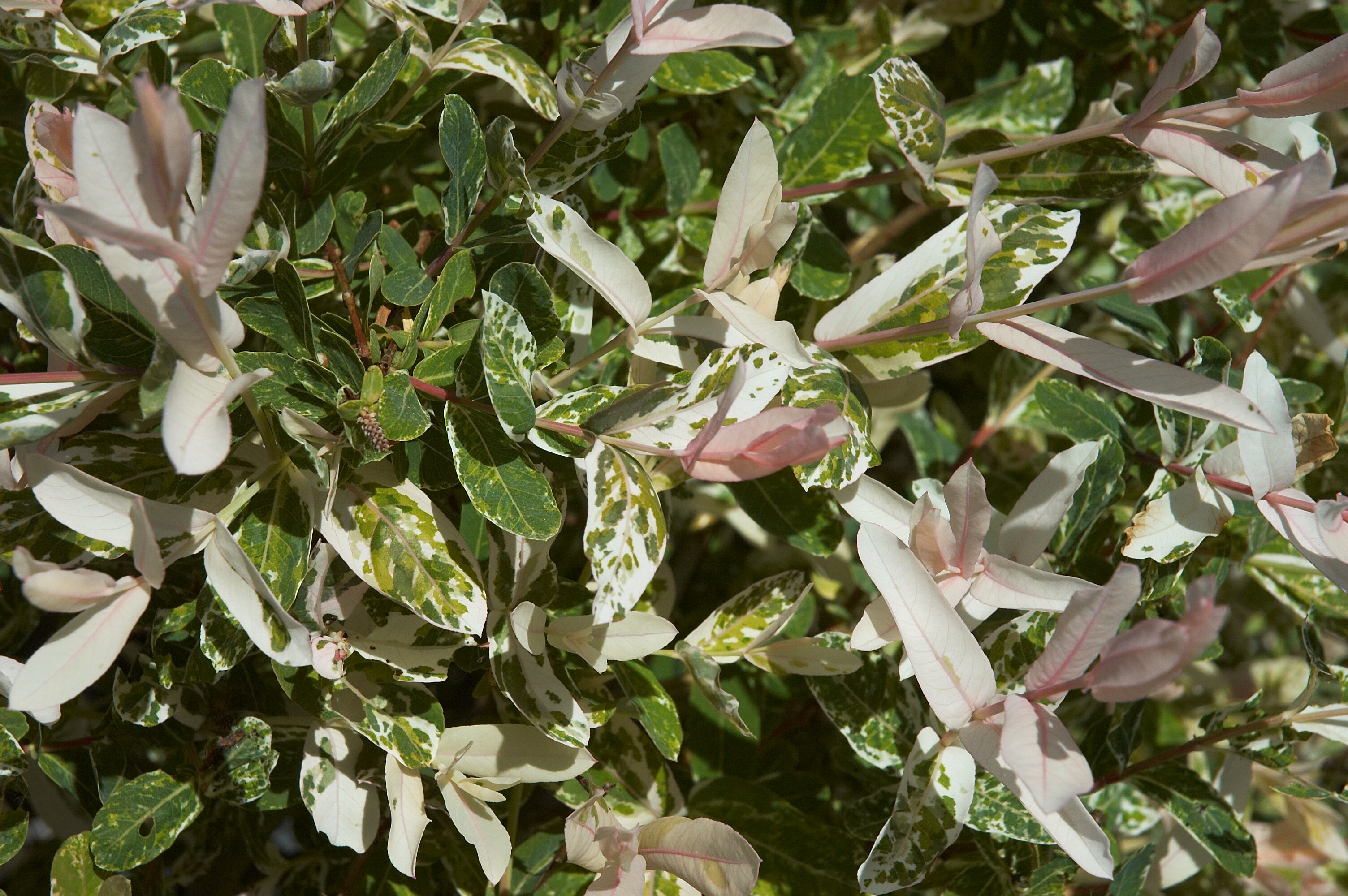 Salix integra ‘Hakuro nishiki’